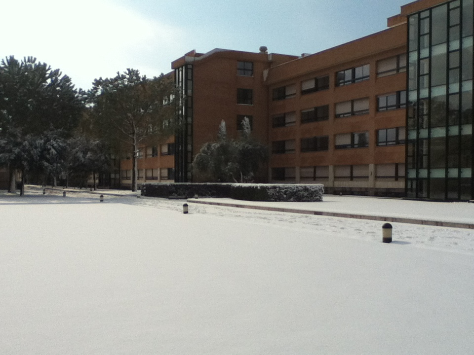 Vista del centro de estudios de los legionarios en Roma